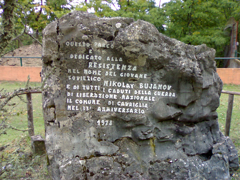 Foto del cippo a Bujanov a Cavriglia